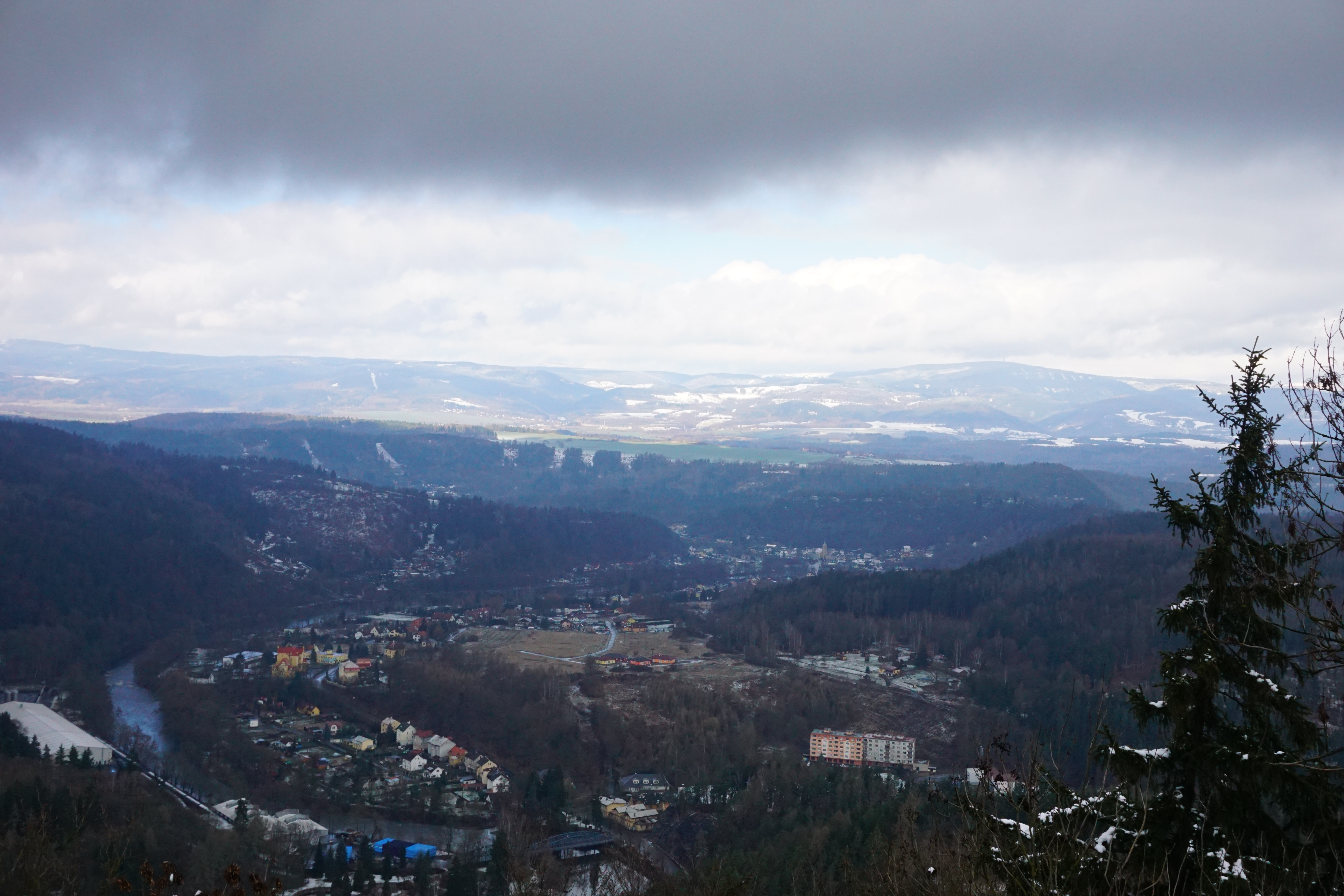 Blick vom der Buchkoppe (Bučina) zum verschneiten Keilberg (Klinovec) Joachimsthal (Jachymov)